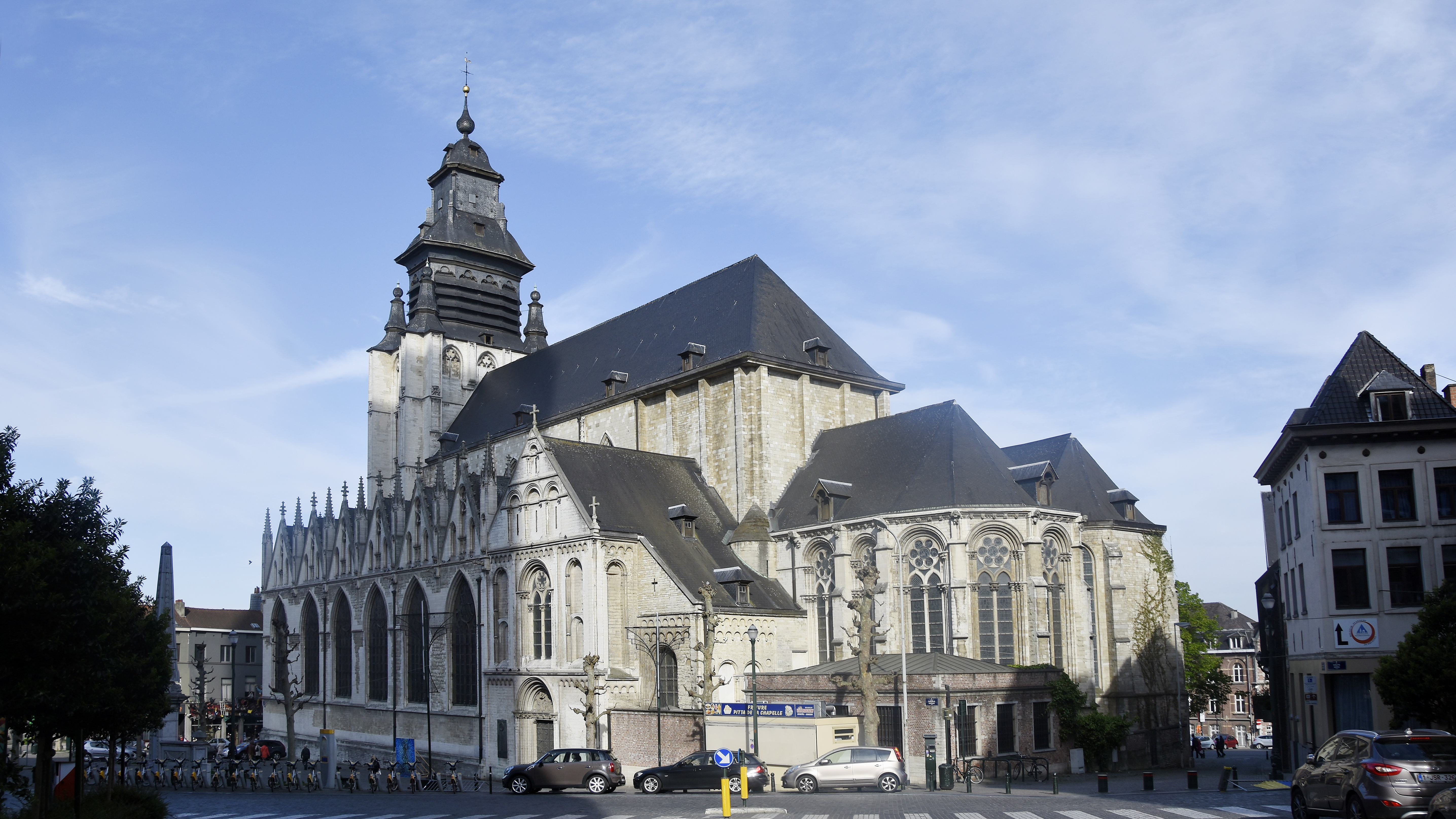 Onze-Lieve-Vrouw-ter-Kapellekerk, Brussel